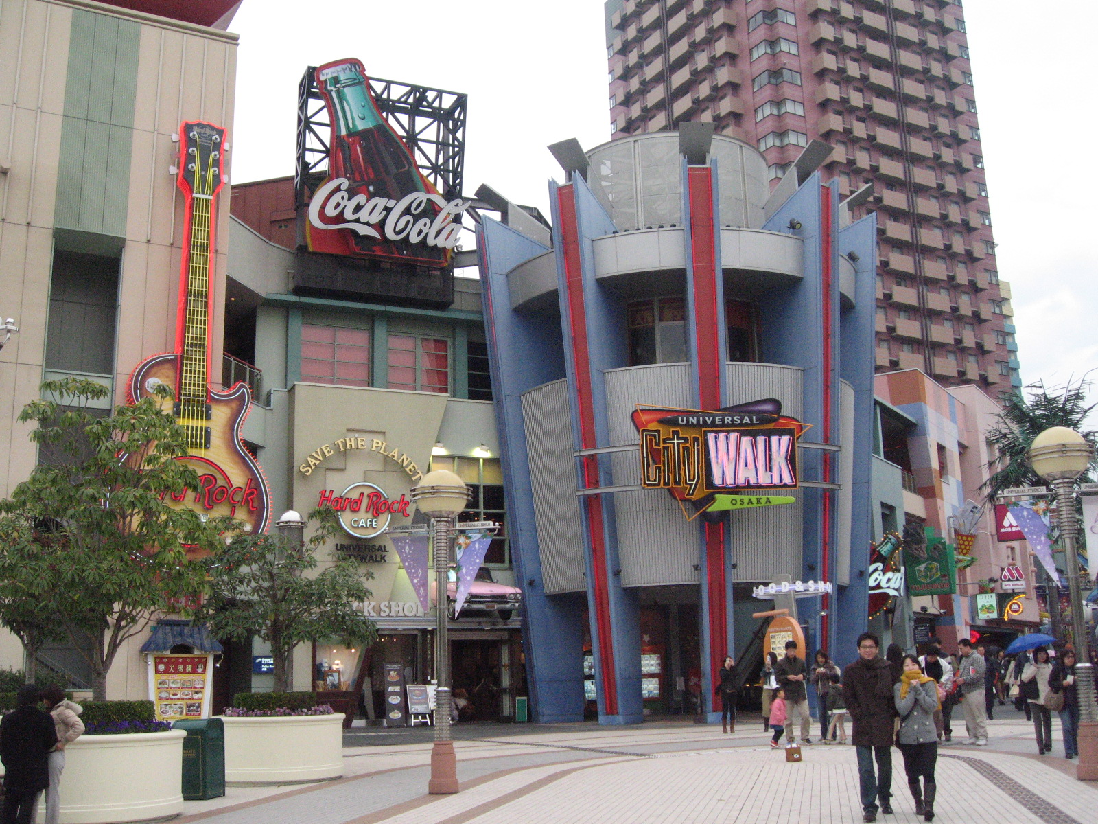 Universal CityWalk Osaka, Osaka, Kansai Region.